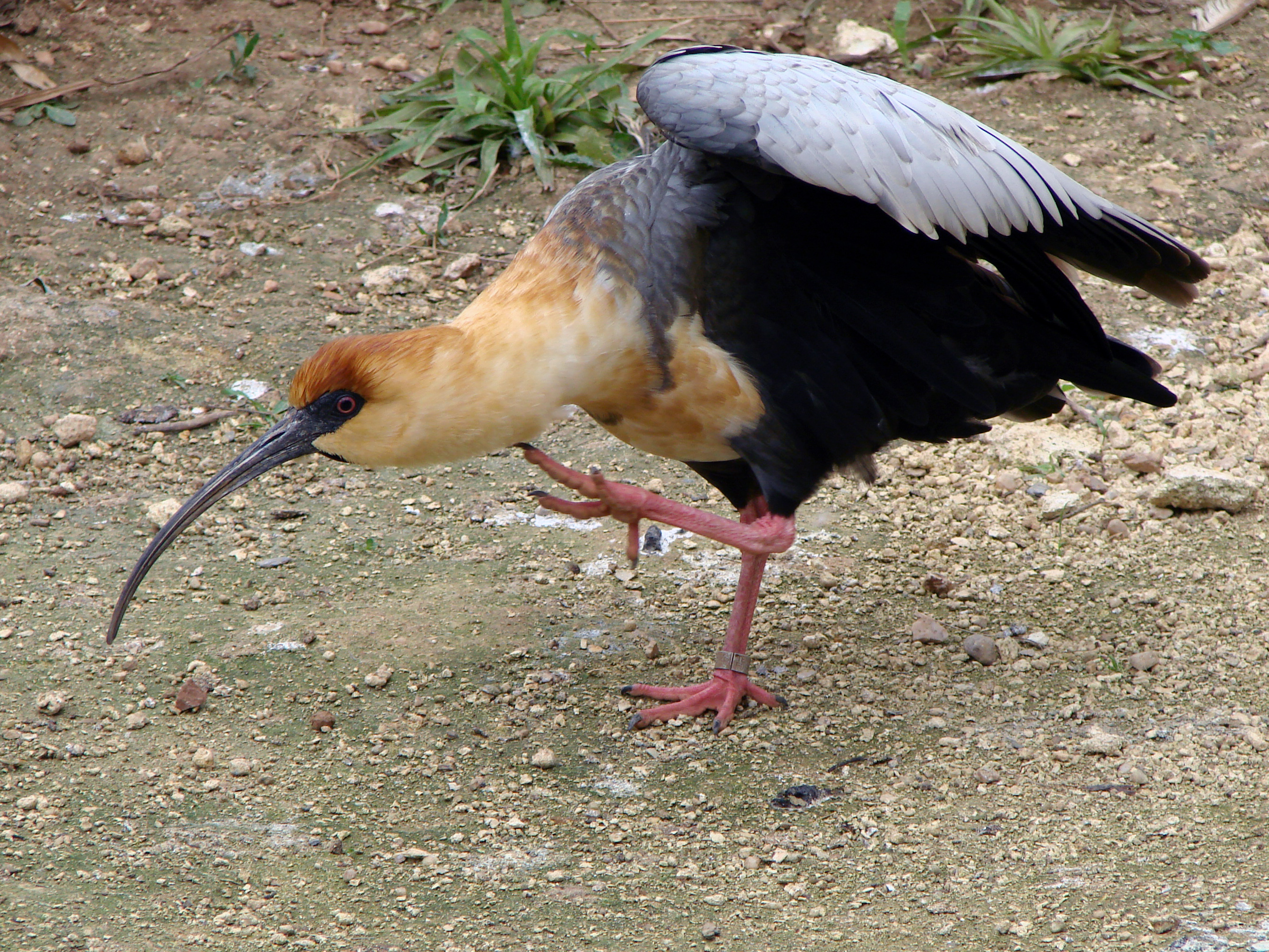 Ibis à face noire (Theristicus Melanopis) au zoo de Doué-la-Fontaine.